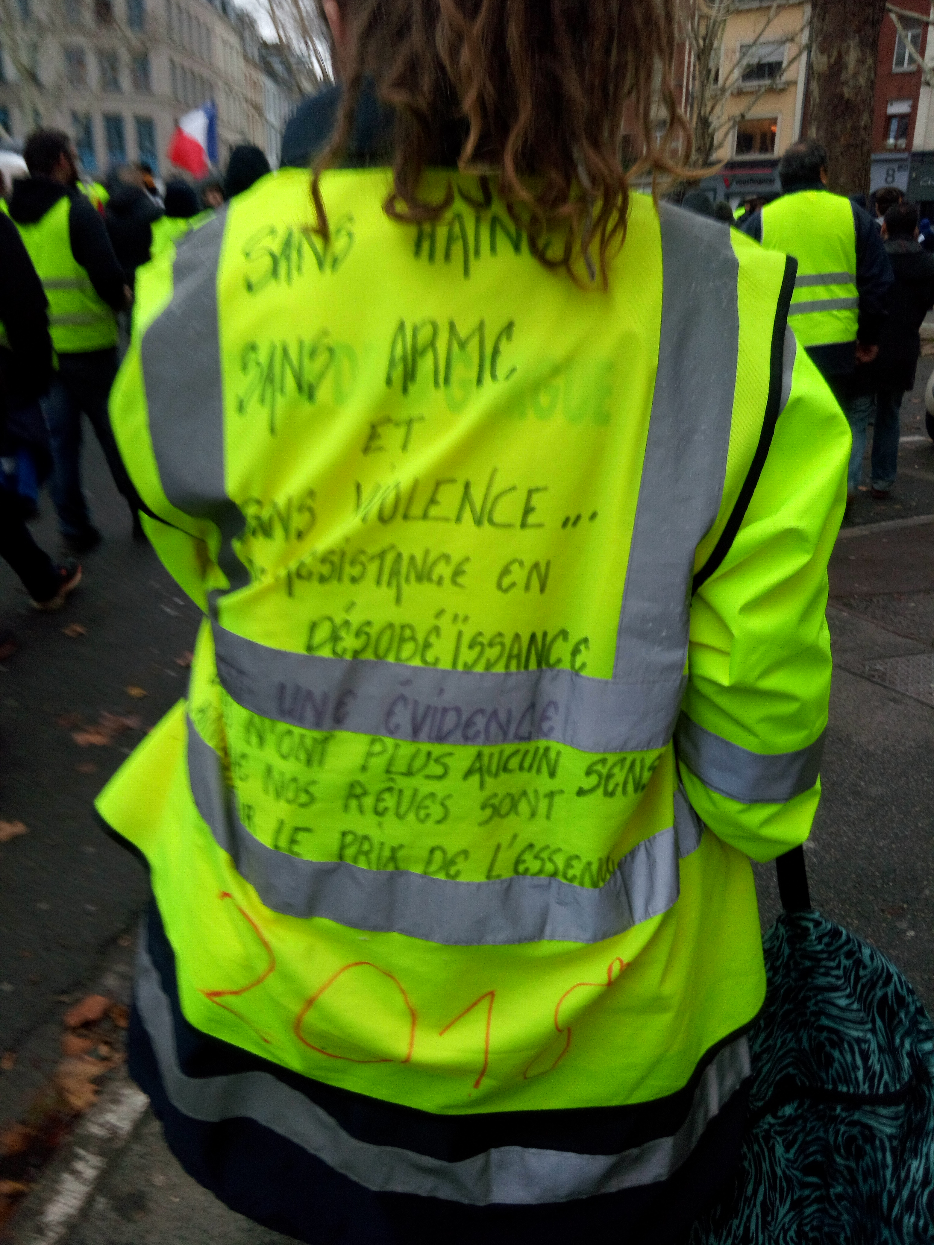 Gilet jaune à Lille: "SANS HAINE SANS ARME ET SANS VIOLENCE... EN RÉSISTANCE EN DÉSOBÉISSANCE (mention masquée) une évidence (mention masquée) n'ont plus aucun sens (mention masquée) le prix de l'essence 2018